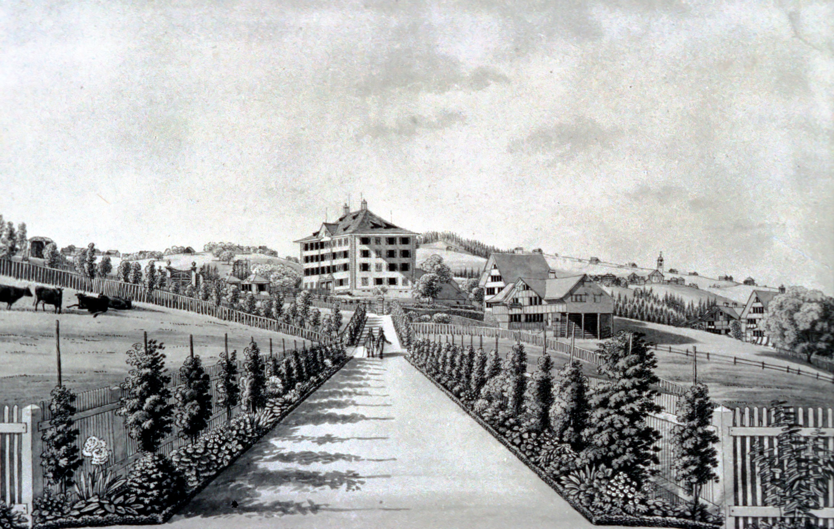 Allee im ehemaligen Honnerlagschen Garten, im Hintergrund der Honnerlagsche Doppelpalast